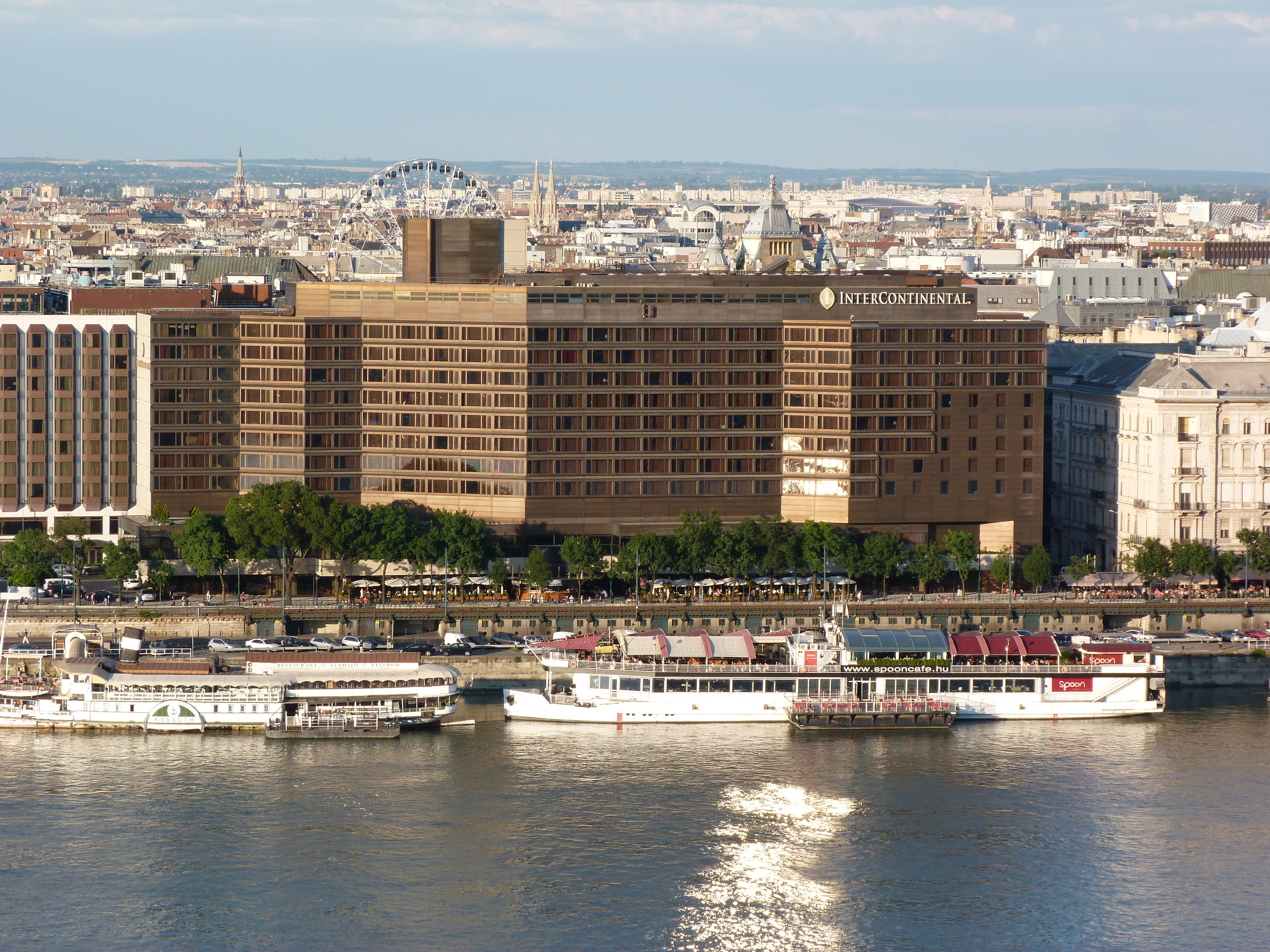 A felvétel 2014.07.15-én készült Budapesten, a Budai Várból. ©© Derzsi Elekes Andor, Budapest, 2014, You are authorised to use these photos and vids under Creative Commons – even for commercial, for profit purposes. Photos must be attributed to Derzsi Elekes Andor. All of the photos and vids in the Metapolisz DVD line are under Creative Commons and can be used even for commercial – for profit – purposes. Recommended Citation Derzsi Elekes Andor: Metapolisz DVD line